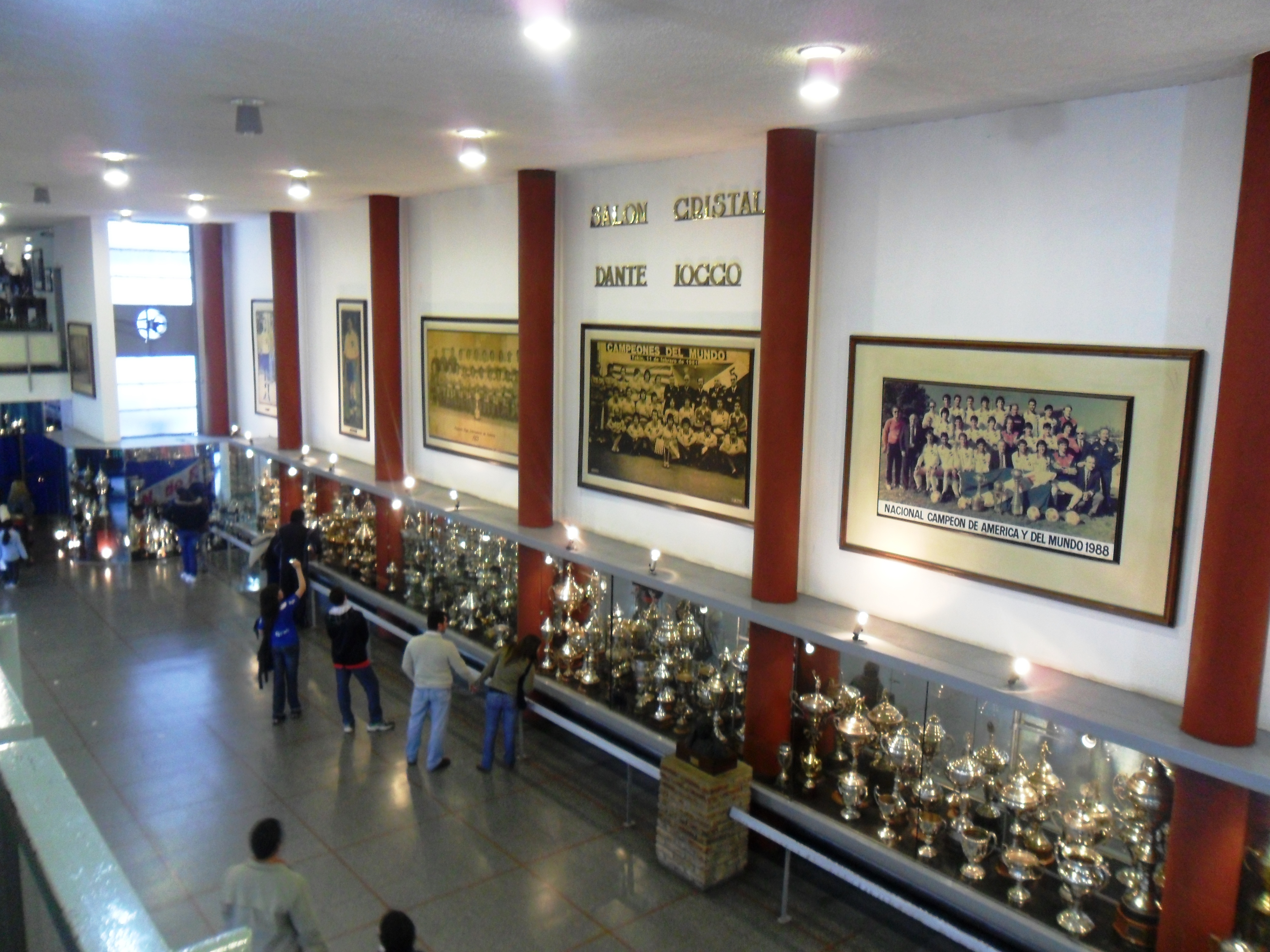 Sede del Club Nacional de Football en el Dïa del Patrimonio (año 2011)